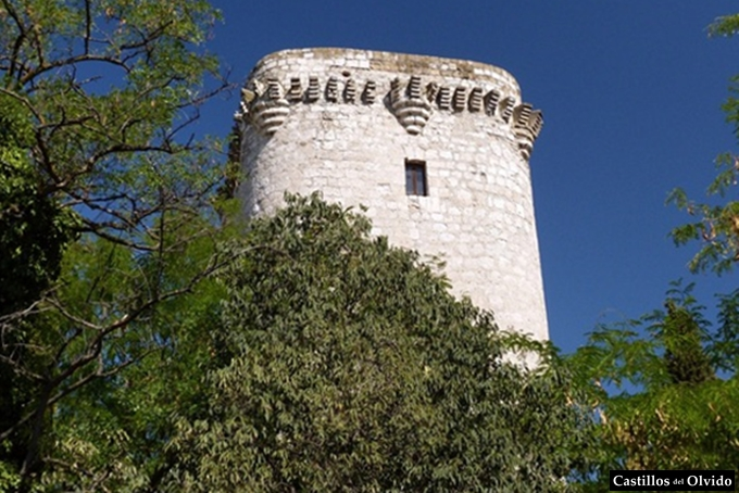 Torre donde estuvo encerrada la Princesa de Éboli